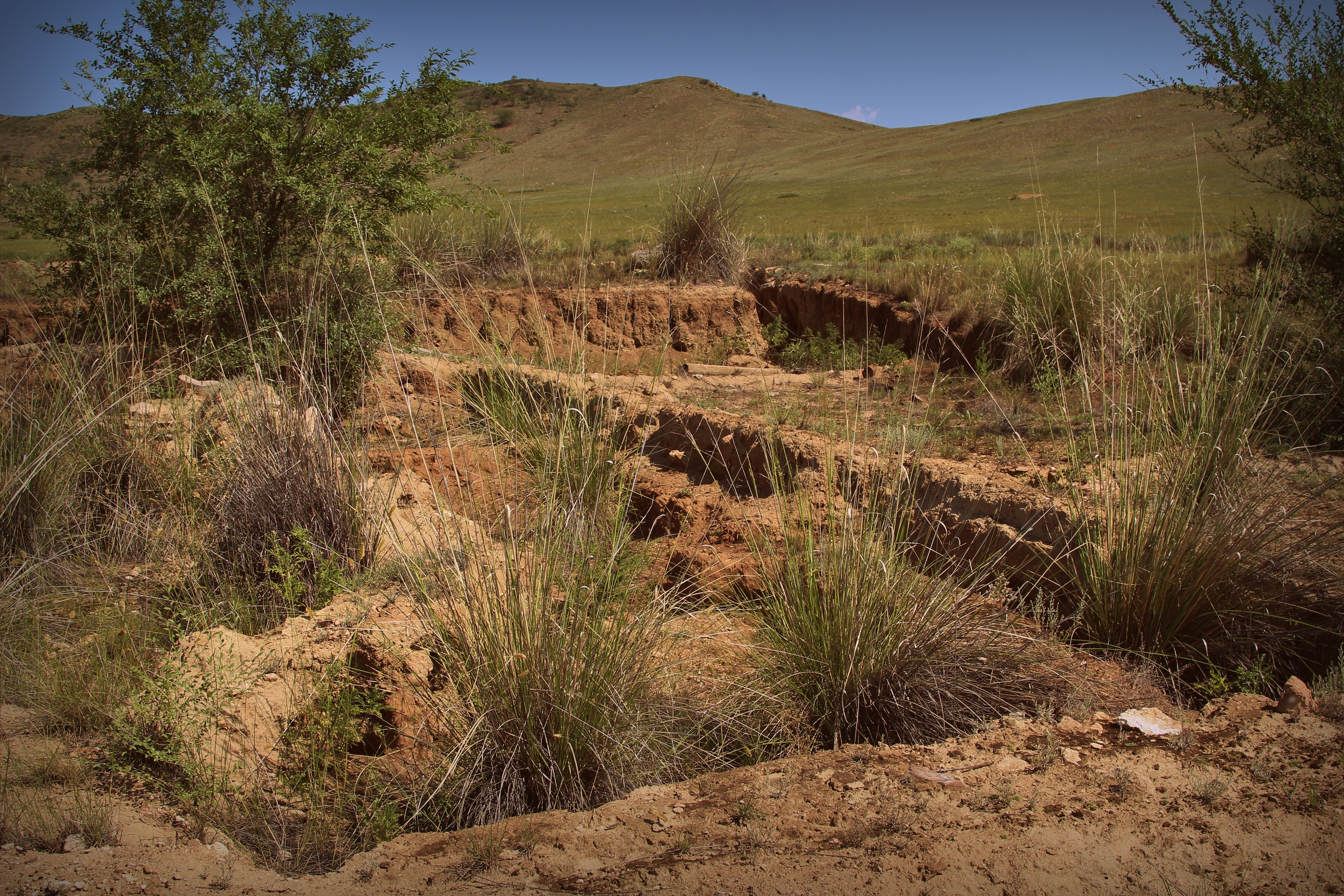 Хуннское городище Баян-Ундэр, Джидинский район, с. Дырестуй